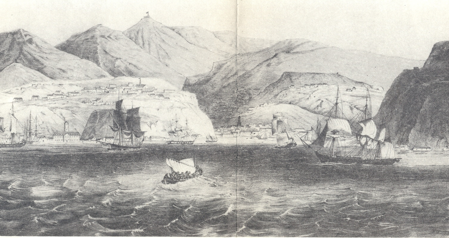 Vista de la Bahía de Valparaíso